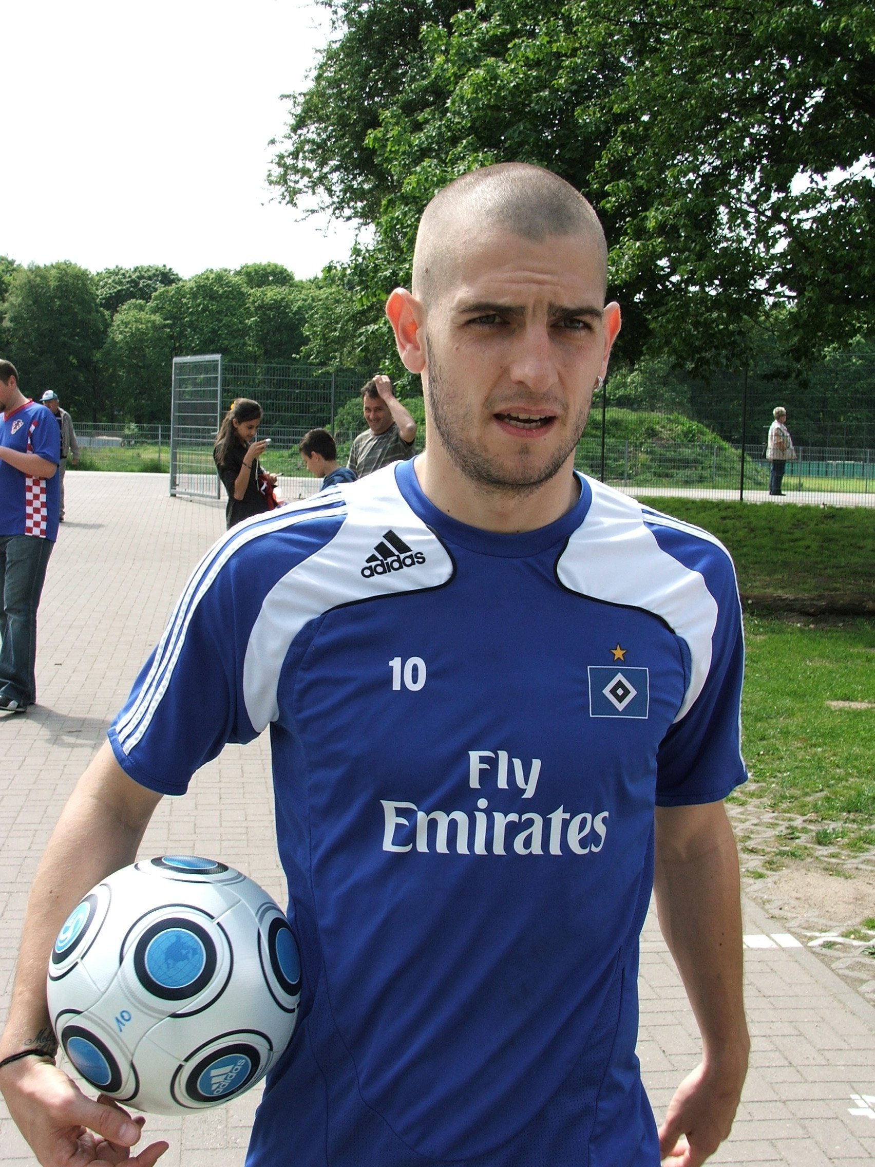 Mladen Petrić nach dem Training